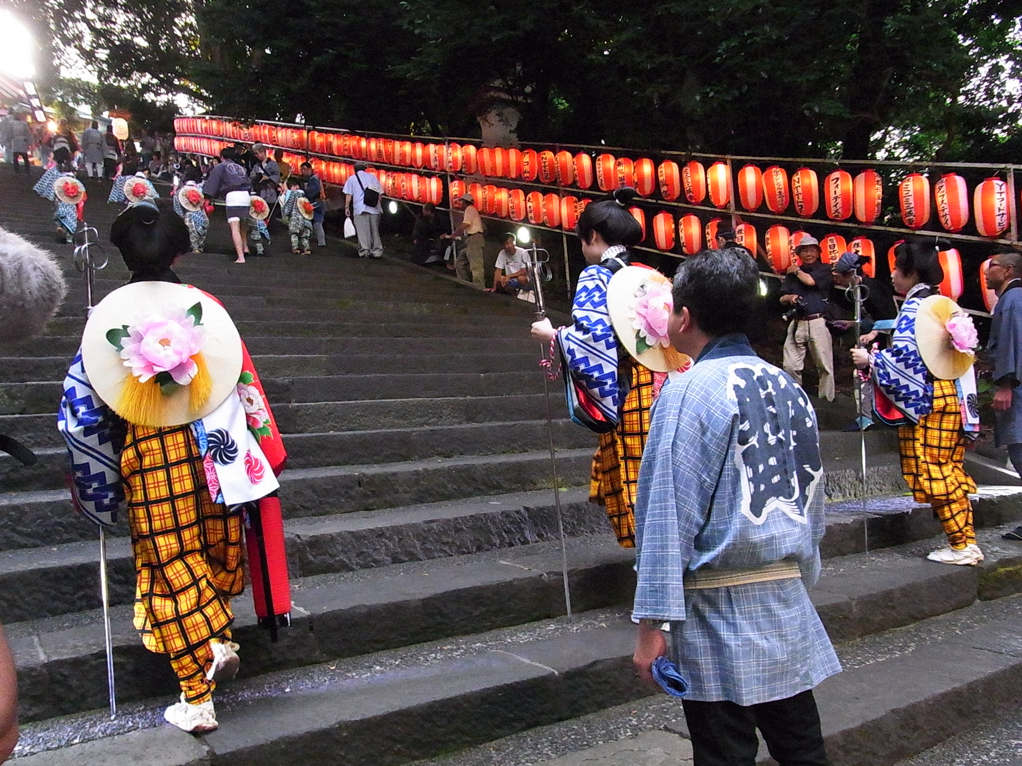 日枝神社 山王祭